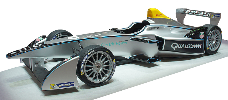 Formule E Spark-Reneault